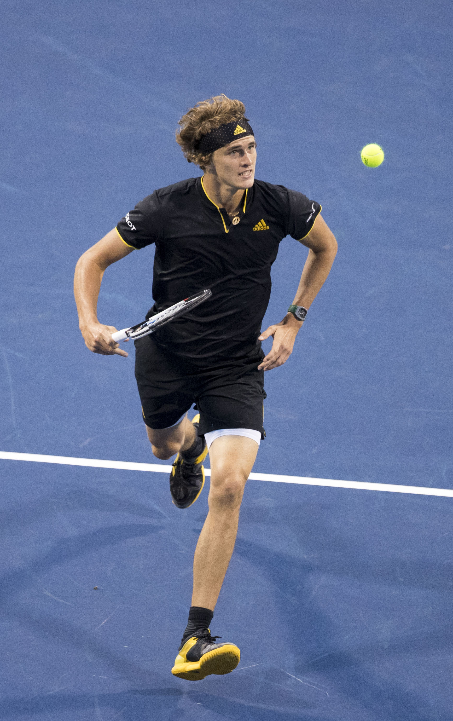 Citi Open Tennis 2017